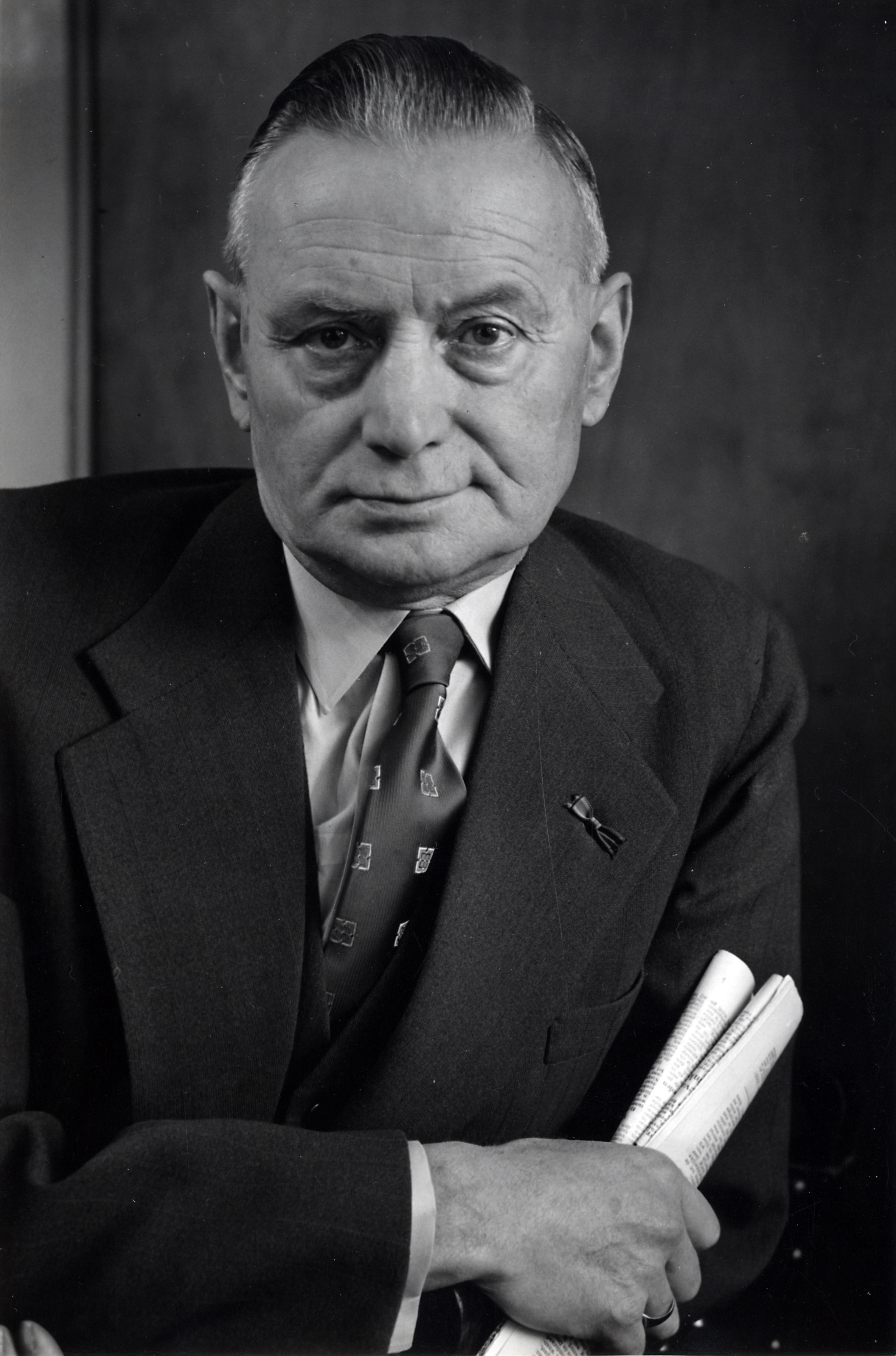 Andriessen, W.J. (RKSP / KVP). W.J. Andriessen, Tweede Kamerlid en oud-voorzitter van de KVP. Portret. Nederland, Utrecht, 26 januari 1956.